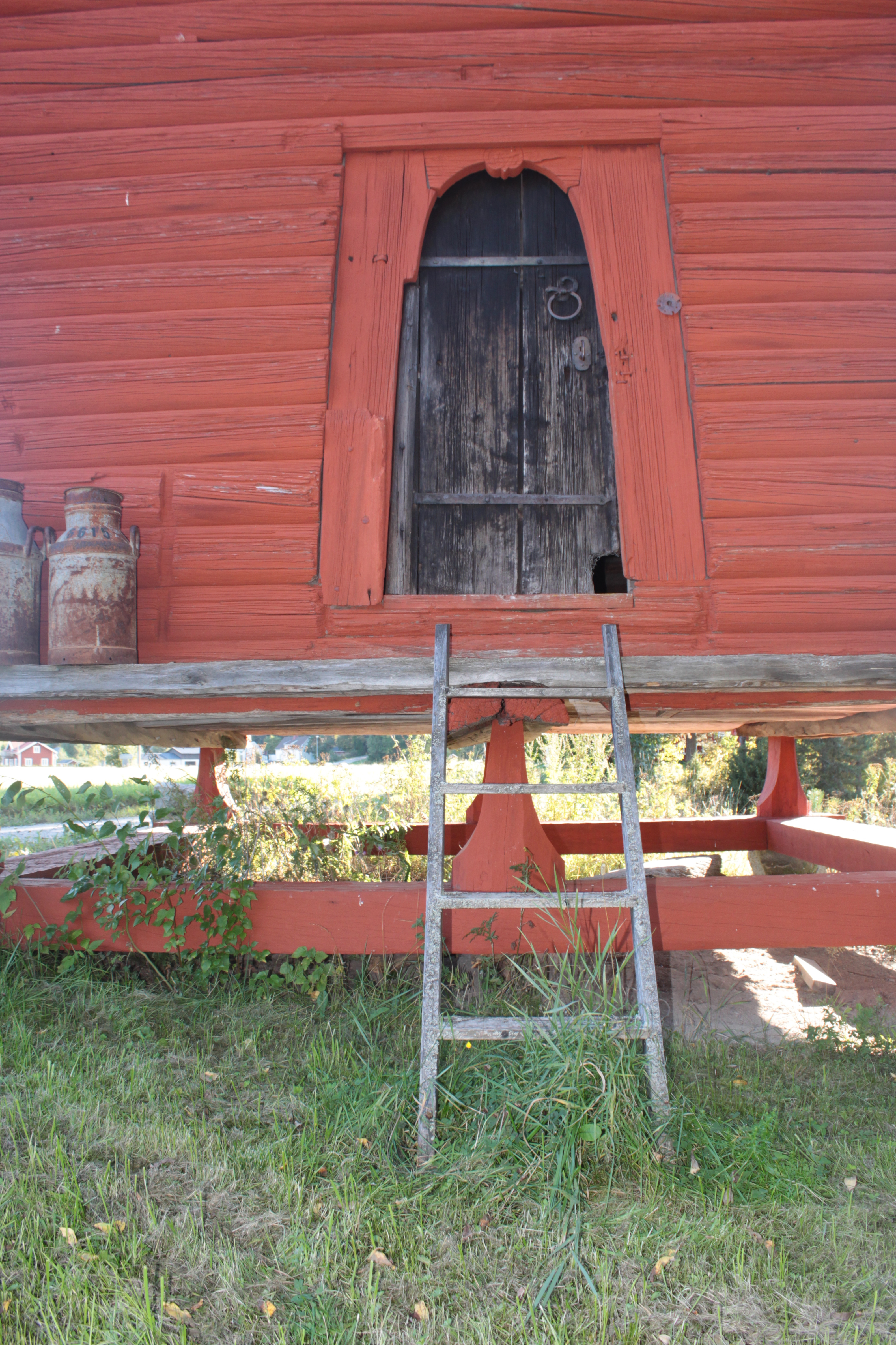 Ingången till Härbret i Yg.